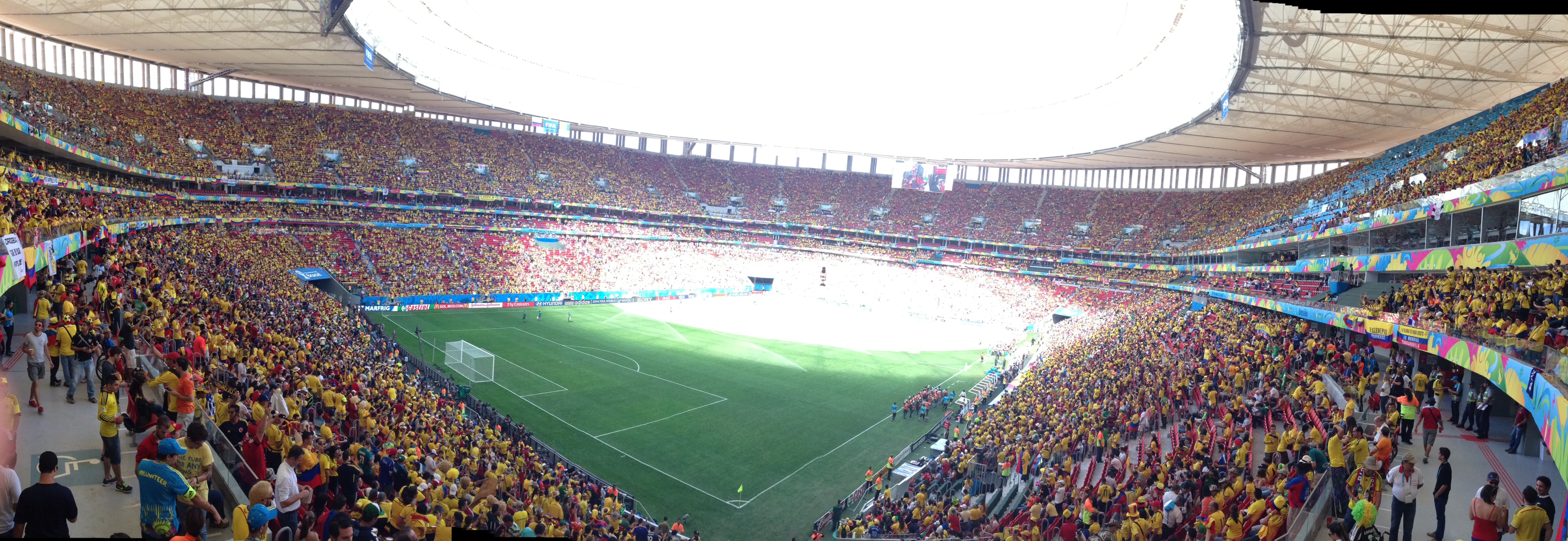 Panoramica Colombia Vs Costa de Marfil